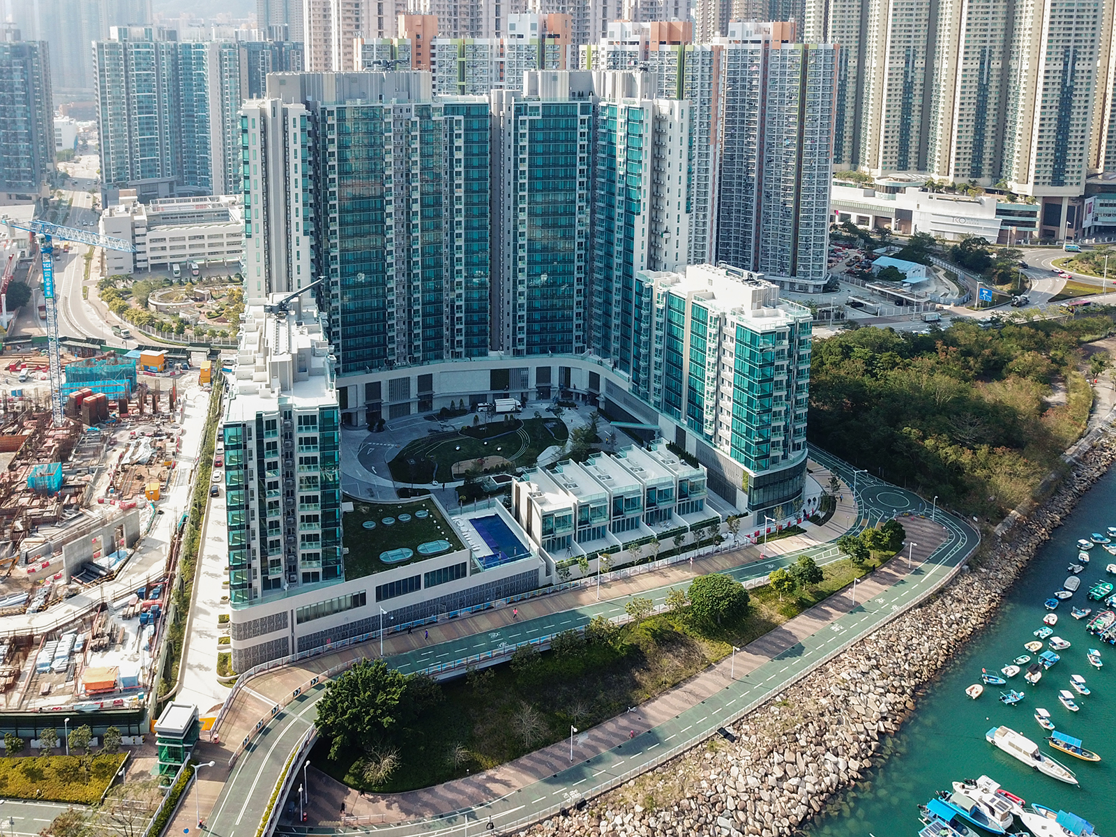 Savannah, Tseung Kwan O